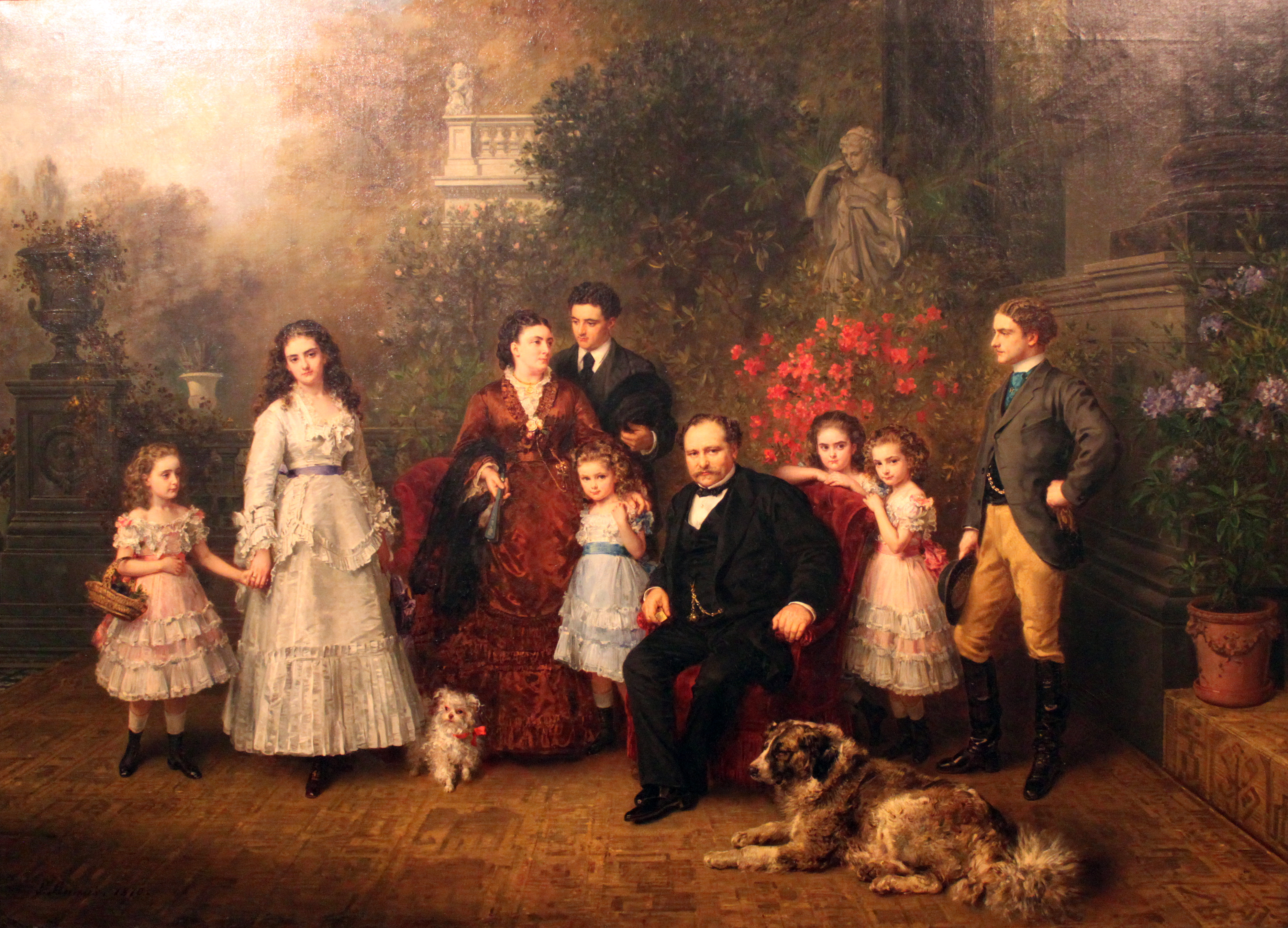 Henry Bethel Strousberg steigt ab 1860 zum erfolgreichsten Eisenbahnmagnaten Deutschlands auf. 1867/68 lässt er sich in der Wilhelmstraße 70 ein luxoriöses Stadtpalais errichten. Als sein Imperium 1873 zusammenbricht und den "Gründerkrach" einleitet, verliert Strousberg fast sein gesamtes Vermögen. 1884 erwirbt die britische Botschaft das Gebäude.